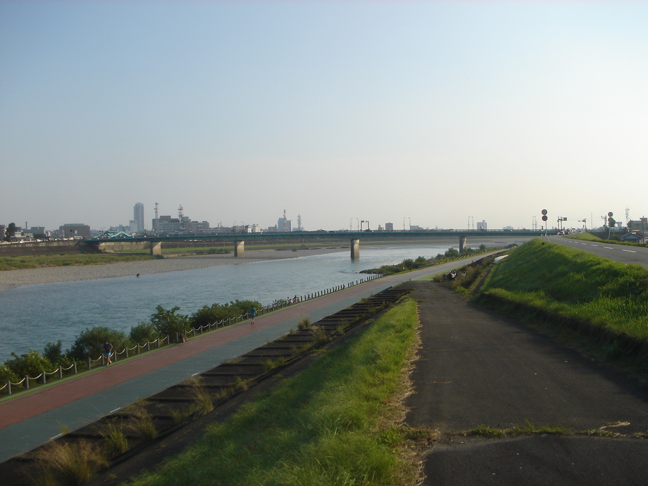 Kinka Bashi(金華橋),Gifu,Gifu,Japan(岐阜県岐阜市)で長良川の右岸堤防（上流側）より撮影。河川沿いの舗装道がw:ja:高橋尚子ロード。